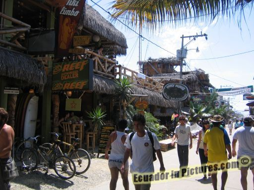 Picture of Montañita Town - Santa Elena - Ecuador